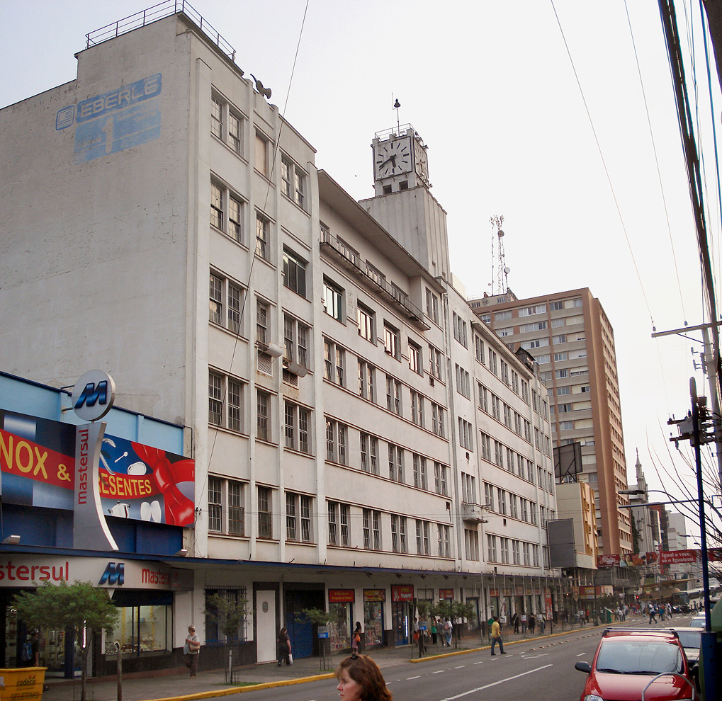 Prédio histórico da antiga Metalúrgica Abarmo Eberle, em Caxias do Sul, Brasil.